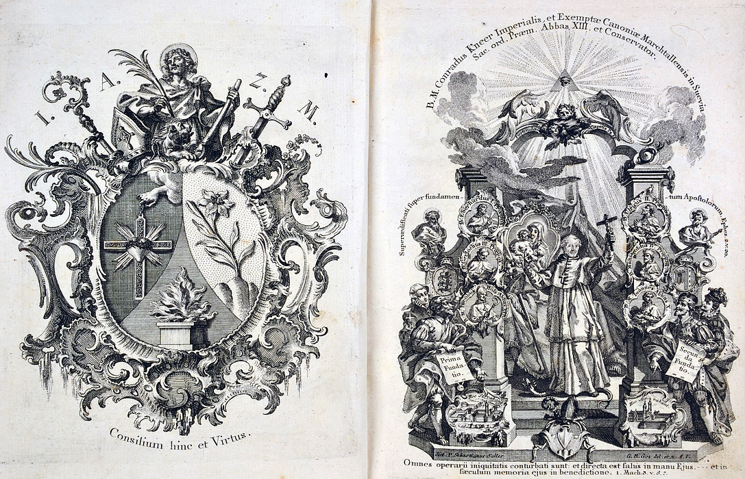 Titel von: Sebastian Sailer: Das jubilierende Marchtall, oder Lebensgeschichte des hochseligen Konrad Kneers. Obermarchtal 1771.